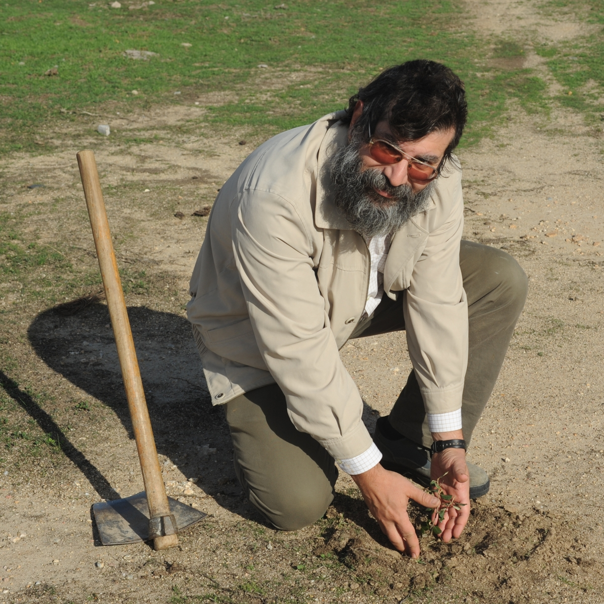 Miguel Herrero Uceda plantando una encina en la dehesa extremeña